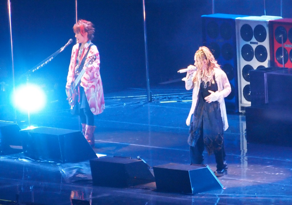 L'arc En Ciel @ MSG - 3/25/12 - 075